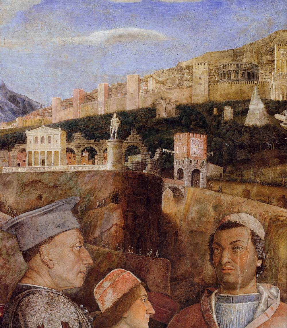 detail